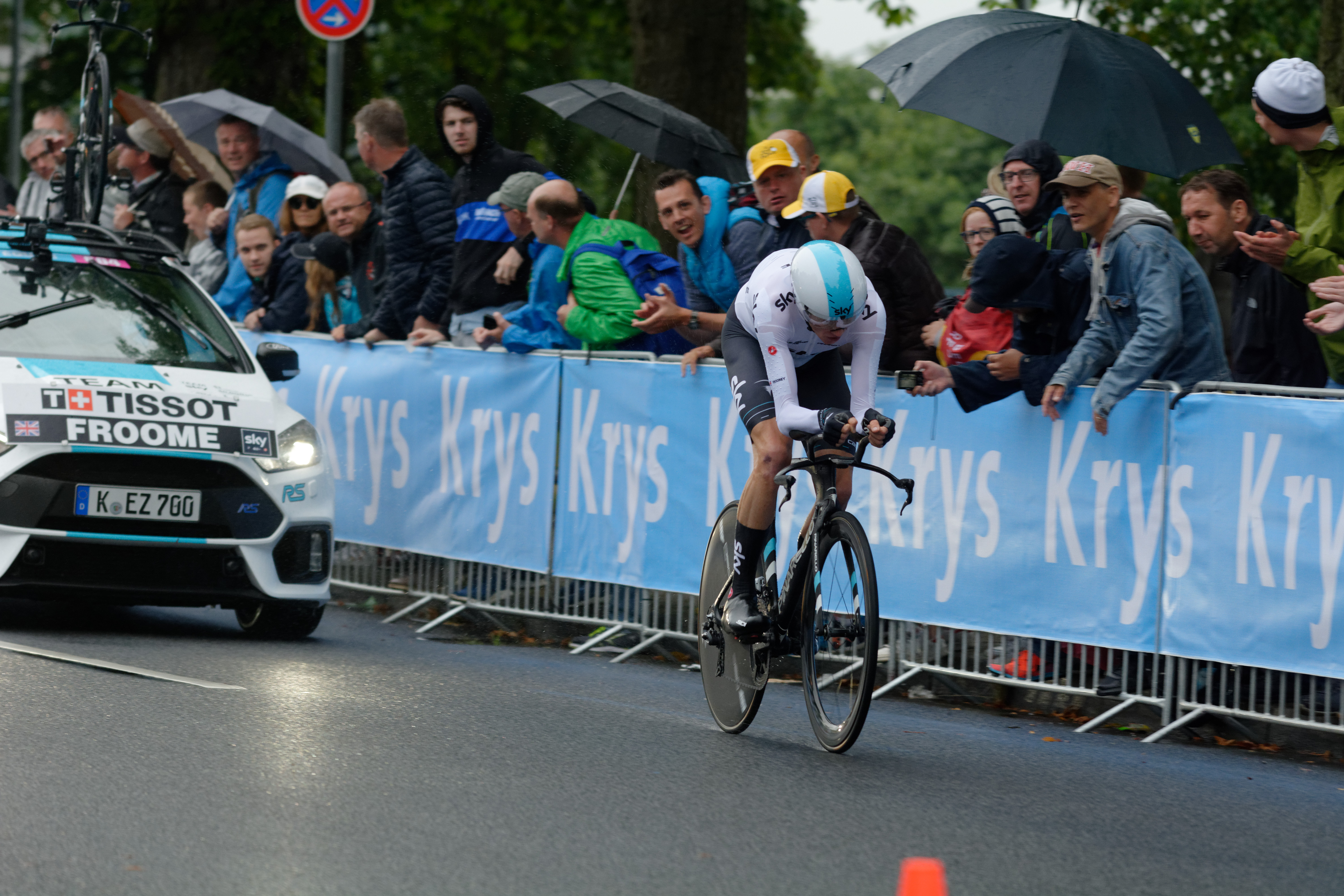 Tour de France 2017 Stage 1 Duesseldolf